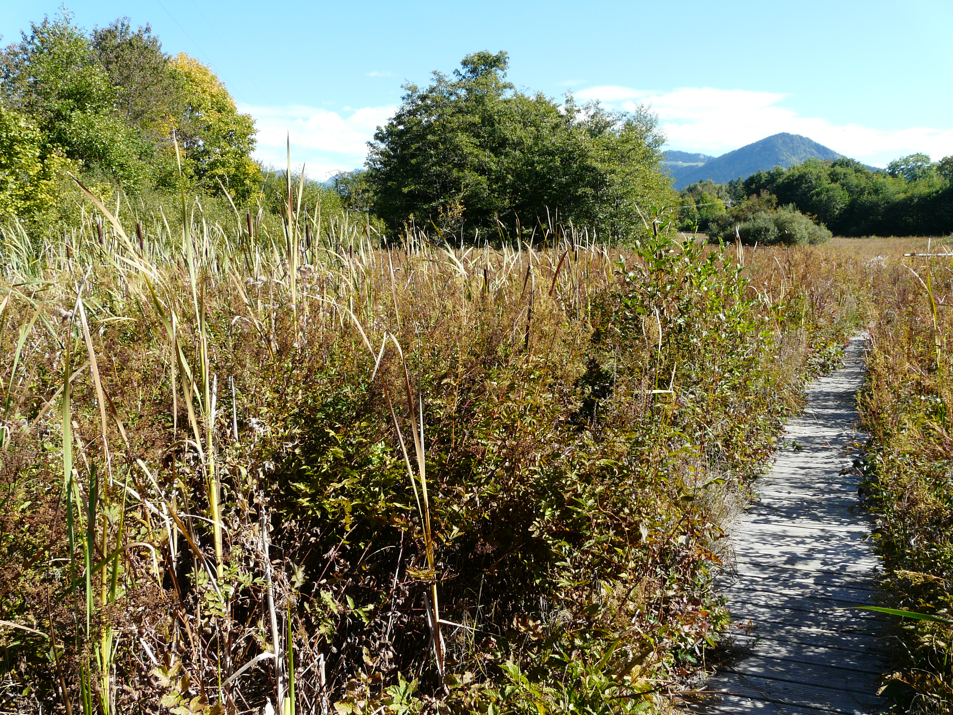 Marais du Maravant, aménagé pour la promenade à Saint-Paul-en-Chablais (F 74)